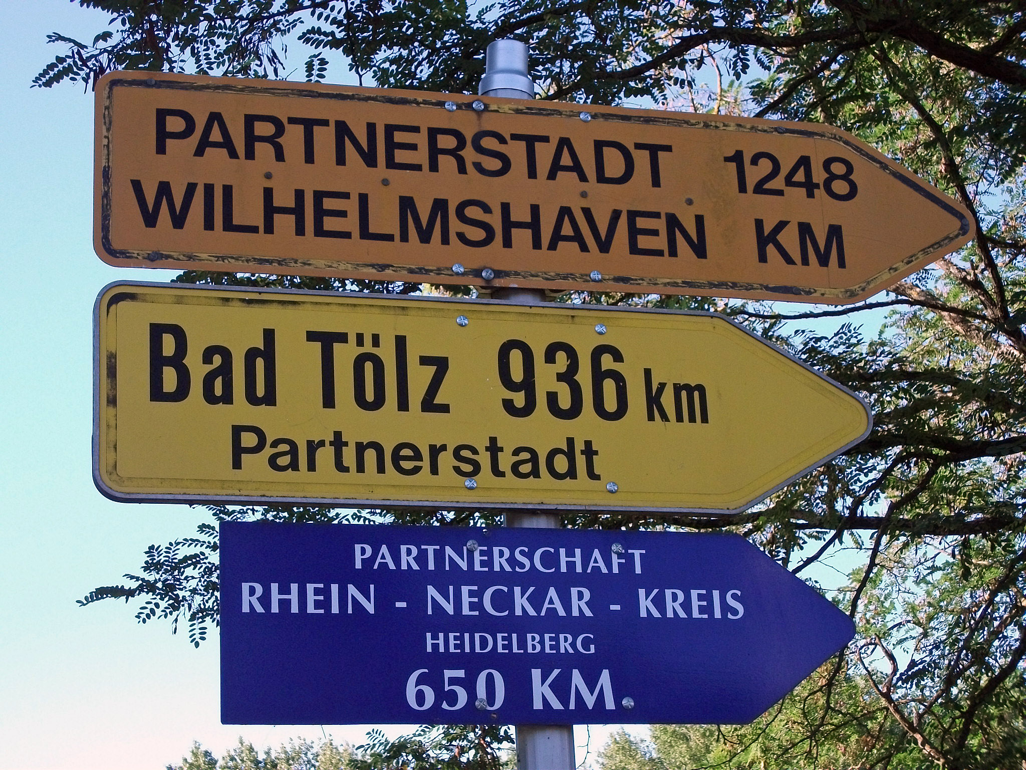 Panneau d'indication des villes jumelées avec Vichy (Wilhelmshaven à 1248 km, Bad Tölz à 936 km, Rhein-Neckar-Kreis - Heidelberg à 650 km) depuis la sortie du parc omnisports sur la commune de Bellerive-sur-Allier.